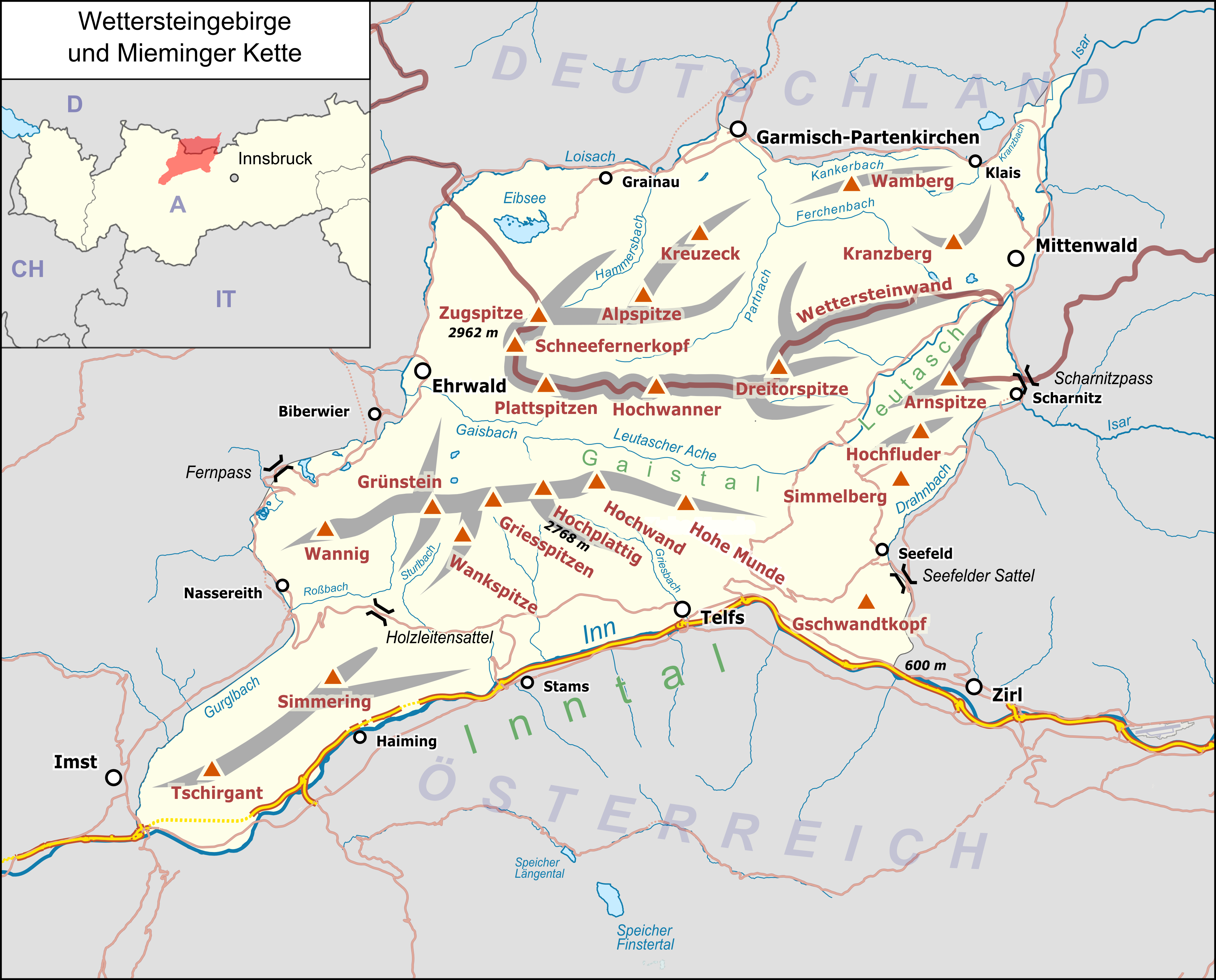 Übersichtskarte der Wettersteingebirge und Mieminger Kette